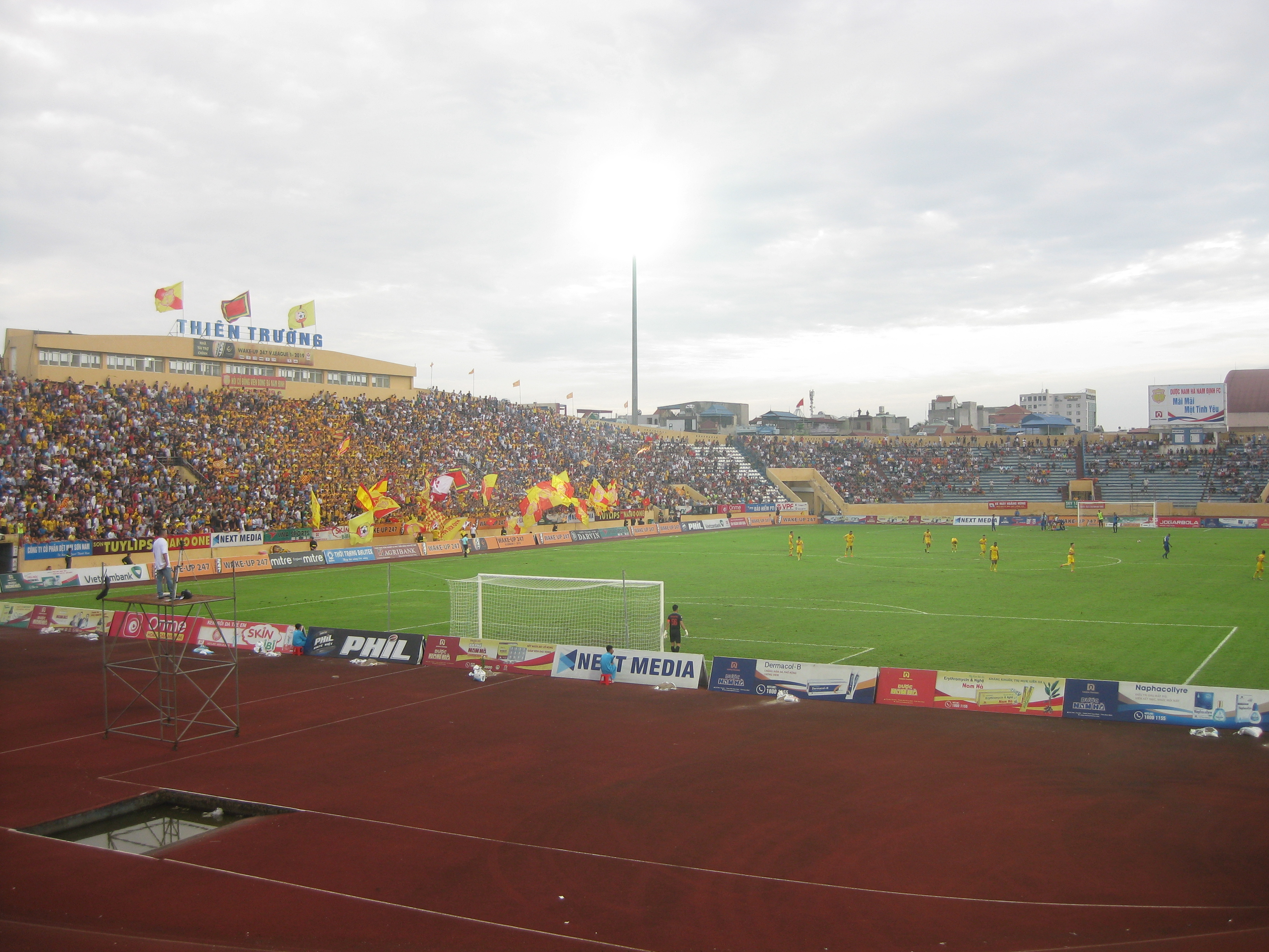 CLB Nam Định thi đấu với CLB Quảng Nam ở giải V-League 1, ngày 17 tháng 8 năm 2019. Chỉ gần một giờ sau khi tấm ảnh này được chụp, sân bị mất điện.